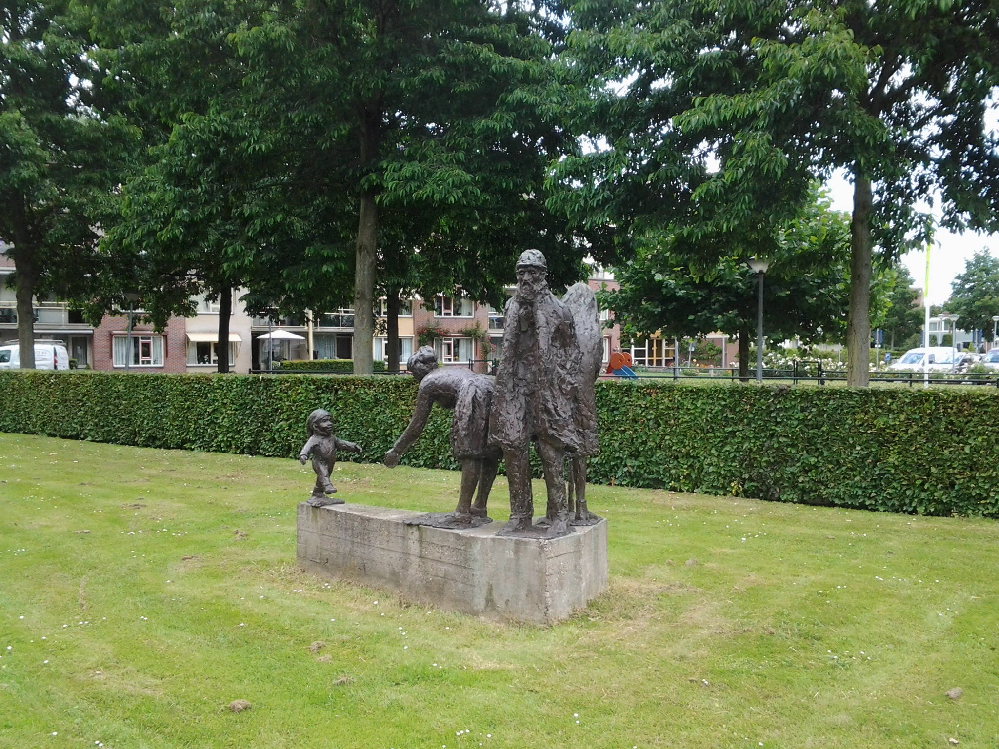 Generaties, beeldengroep van Karel Gomes bij de Schuilhoeve, Keizersweg, Badhoevedorp